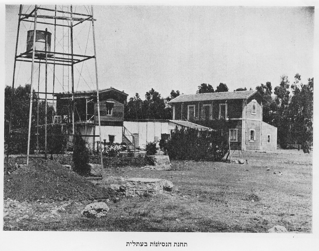 תחנת הנסיונות בעתלית, חוות אהרנסון